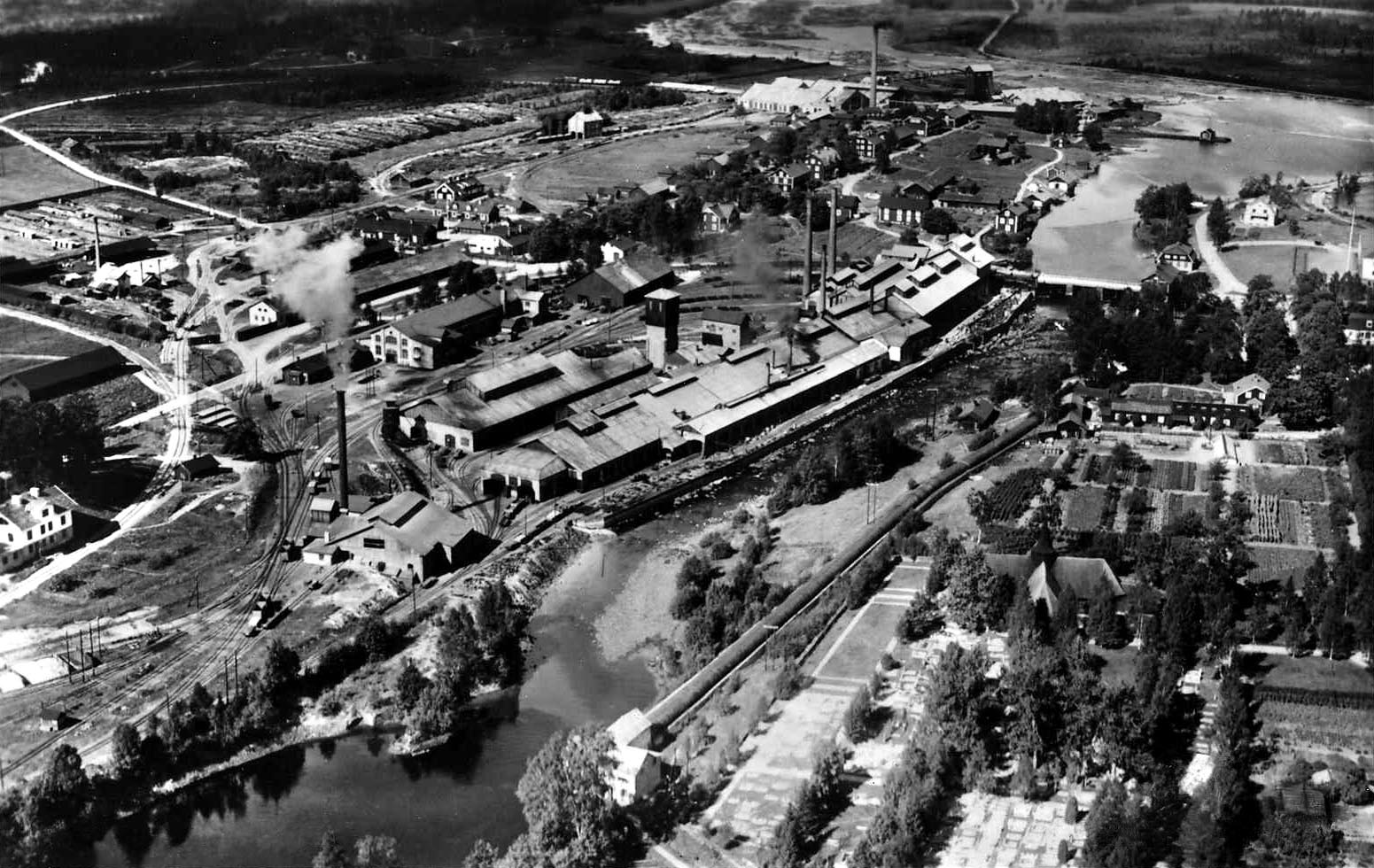 Flygfoto över Hellefors bruk